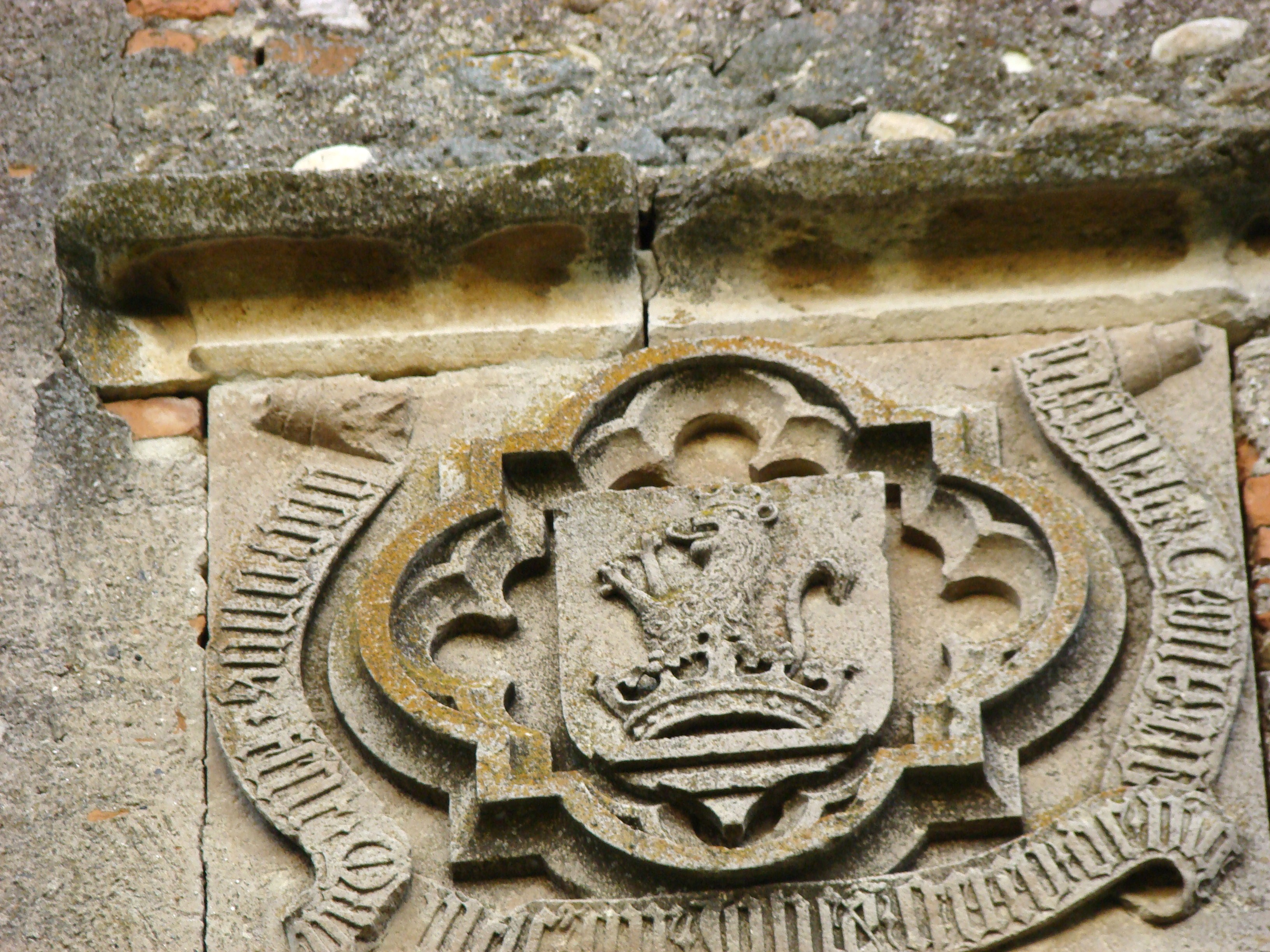 Evangelische Kirche von Vingard (Weingartskirchen), Alba, Siebenbürgen, Rumänien